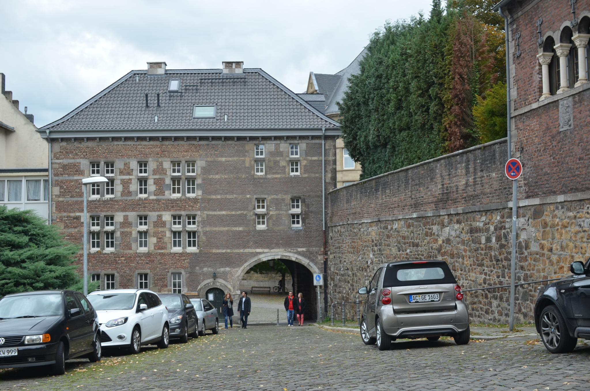 Abteitor